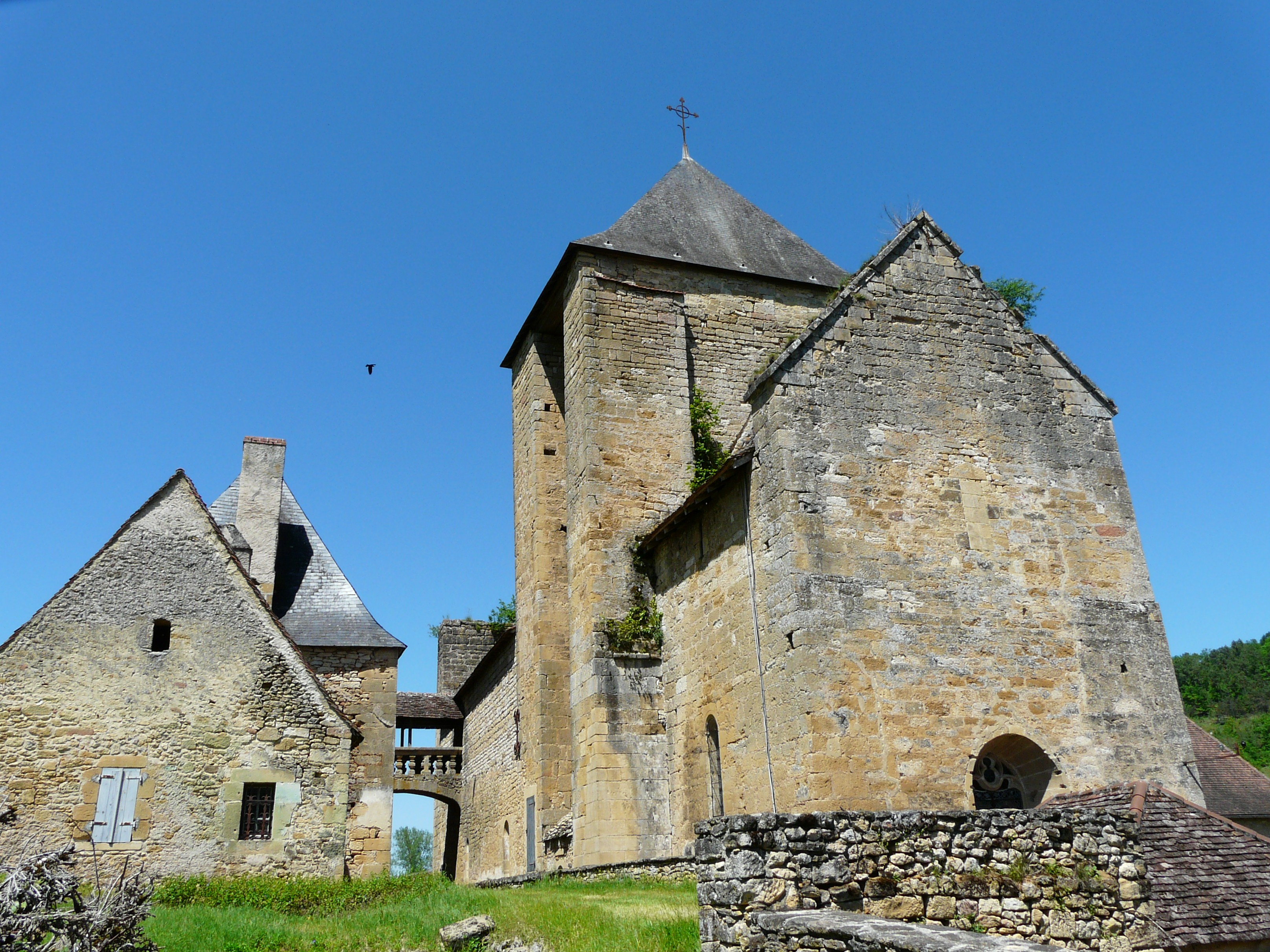 L'église Saint-Étienne et son presbytère sur la gauche, reliés par une passerelle, Auriac-du-Périgord, Dordogne, France.